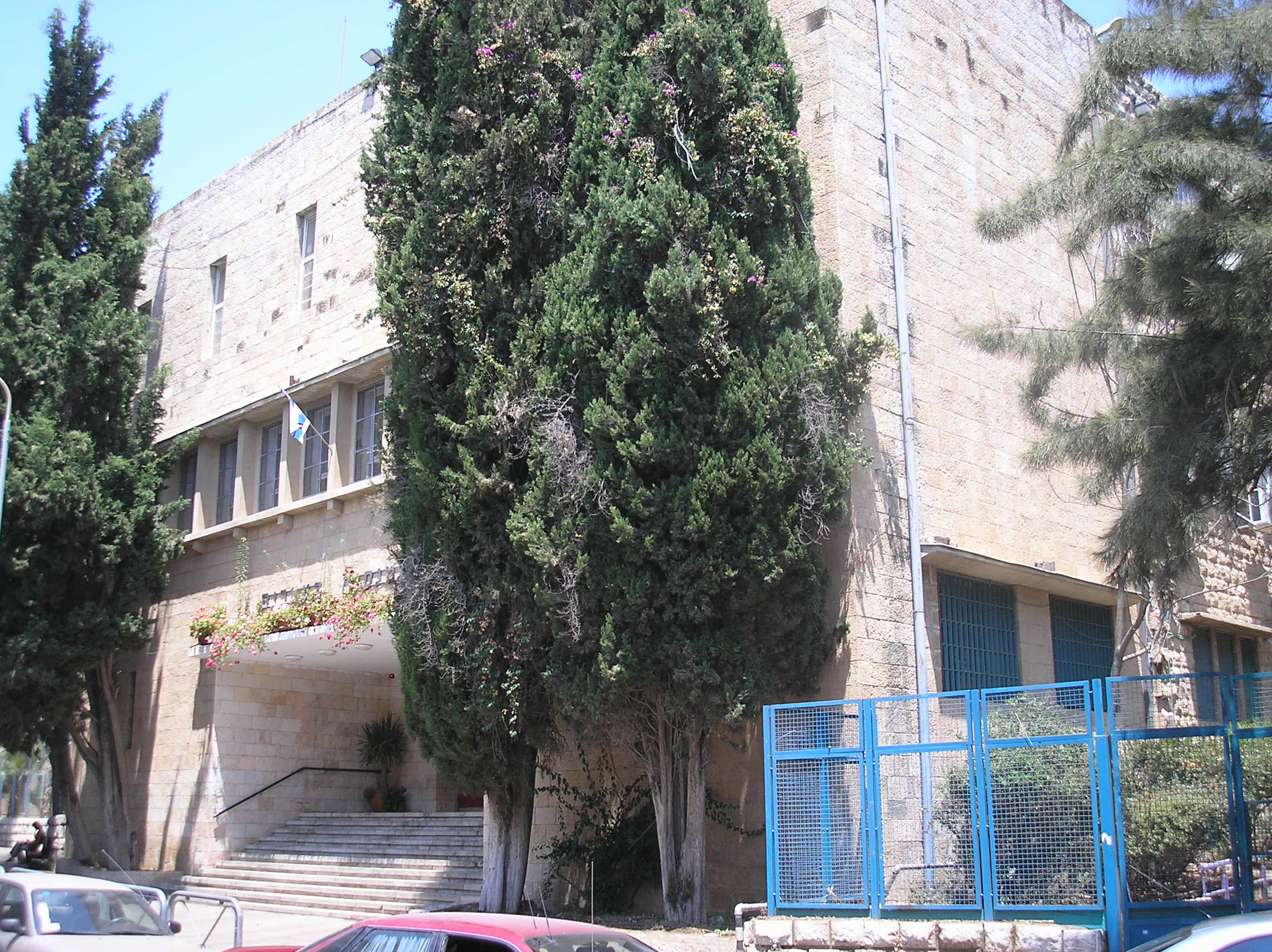 Hagimnasia HaIvrit, Rehavia, Jerusalem